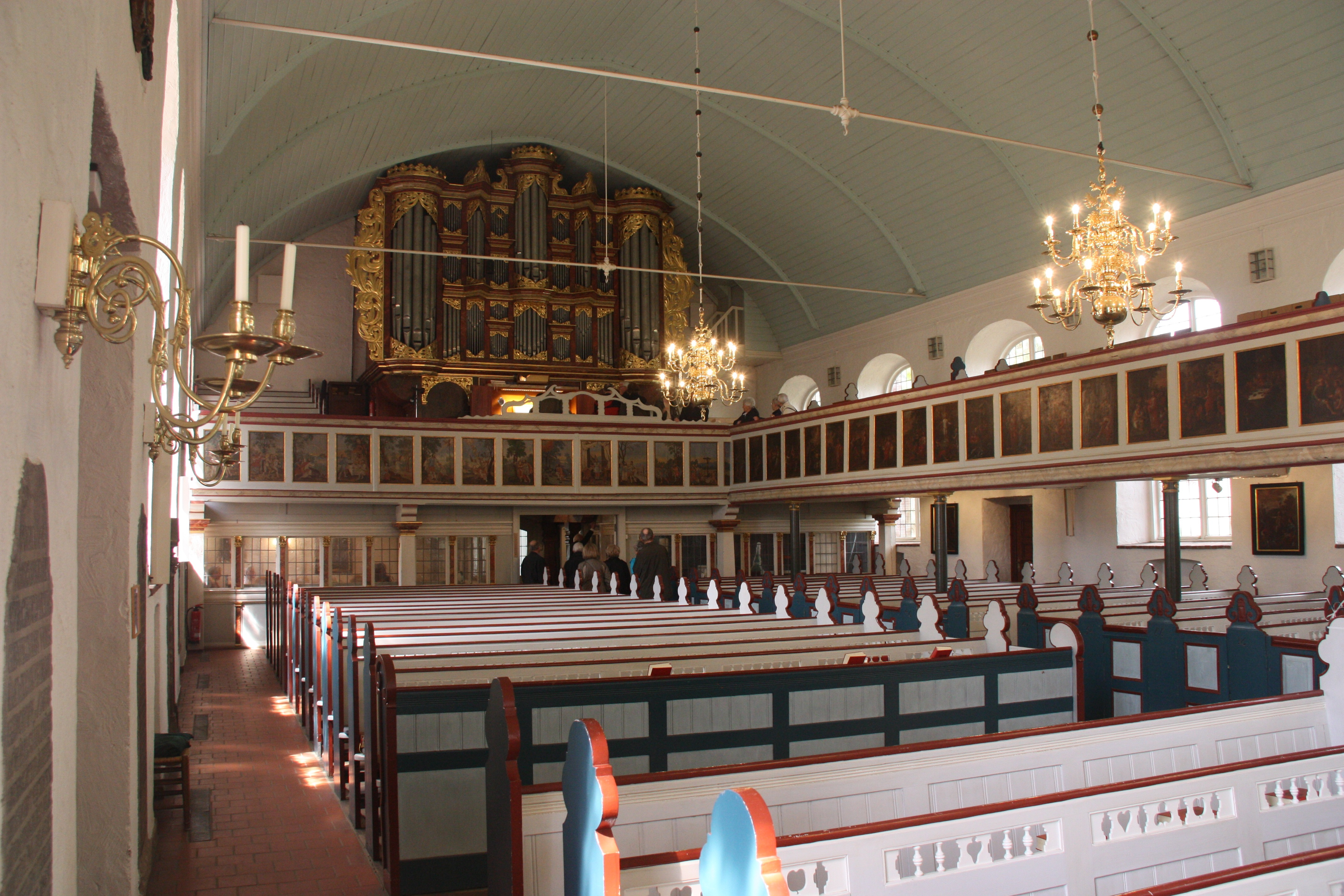 St. Pankratius, Hamburg-Ochsenwerder, Innenraum, Blick zur Orgel